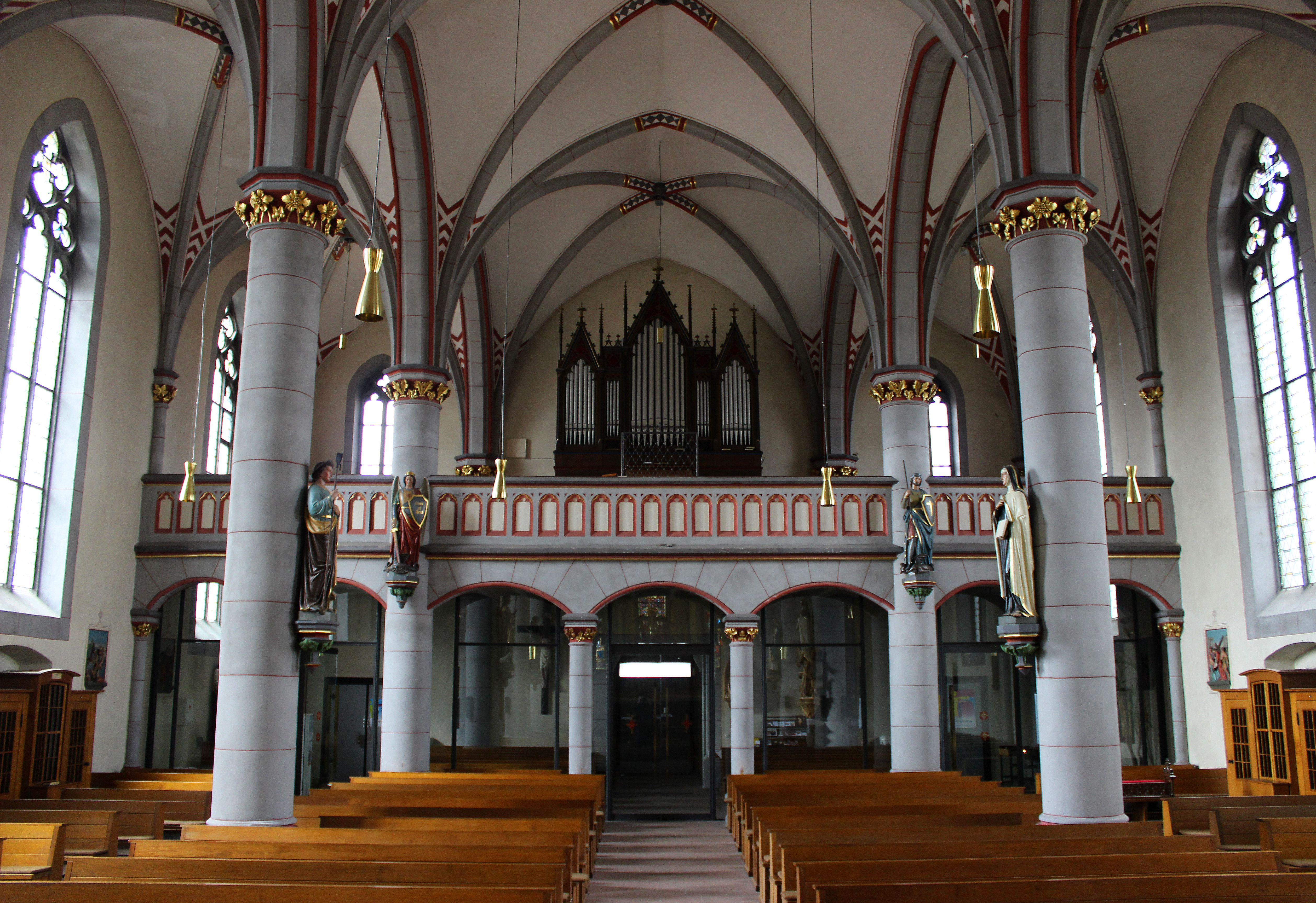 Blick ins Innere der katholischen Pfarrkirche St. Marien in Reisbach, einem Ortsteil der Gemeinde Saarwellingen, Landkreis Saarlouis, Saarland